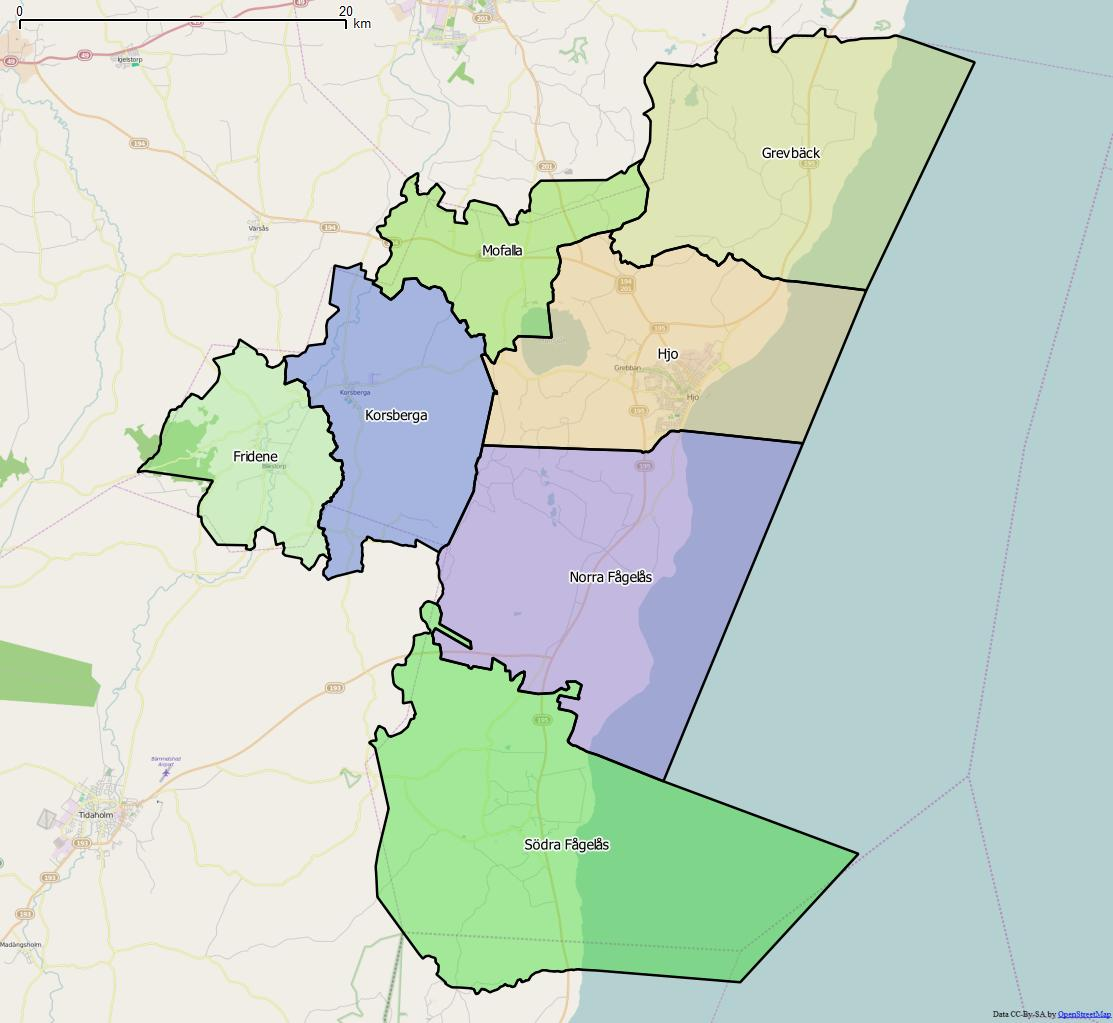 Distriktsindelningen i Hjo kommun